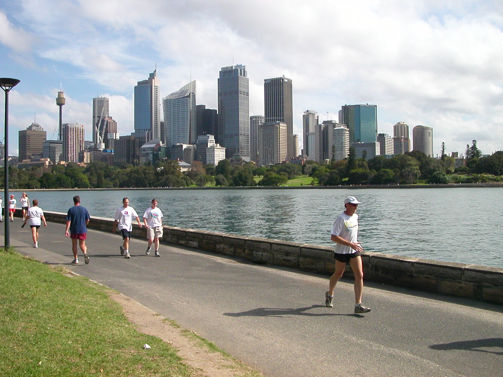 Down Town Sydney